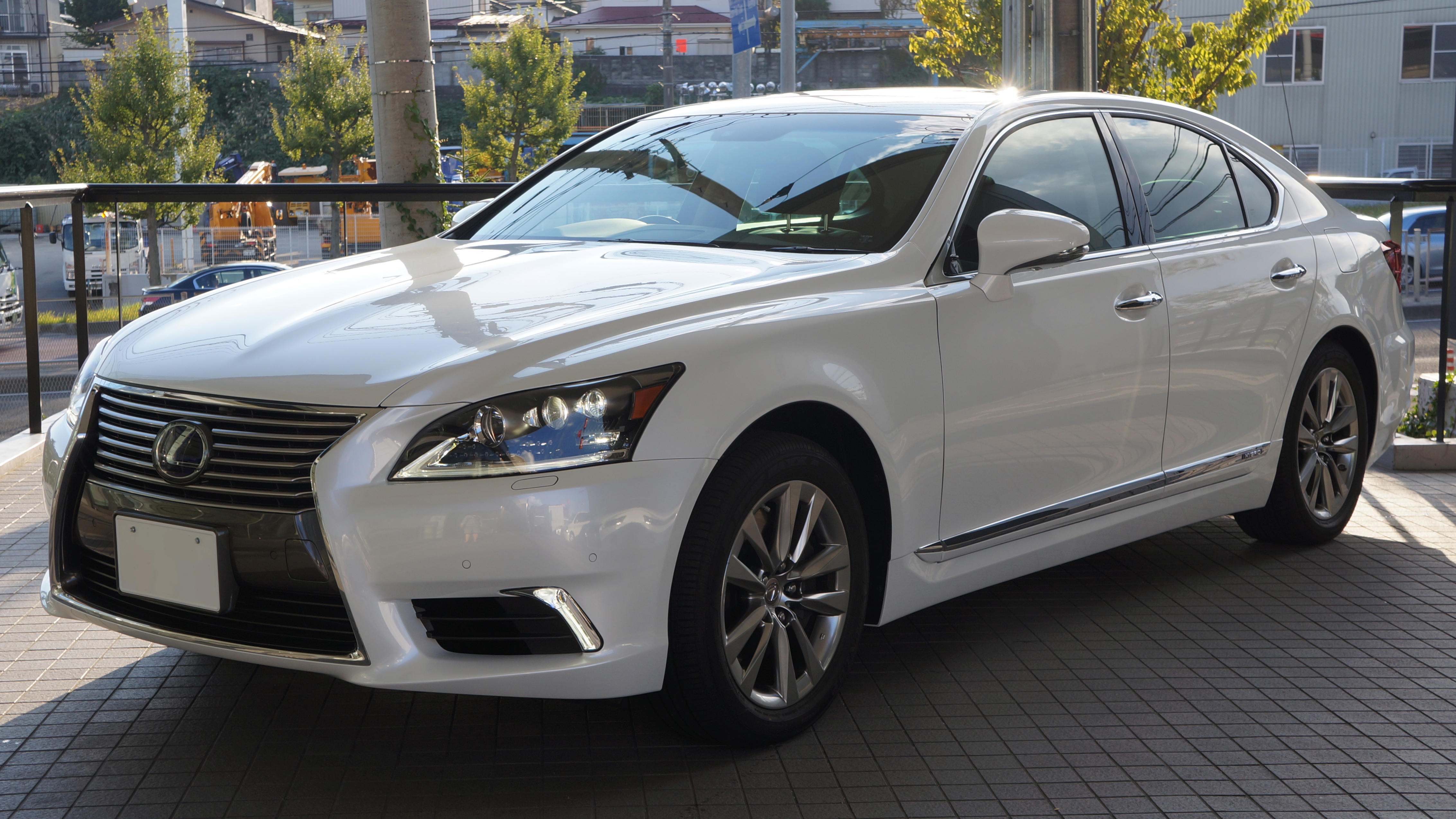 レクサス LS600h 2012年モデル日本仕様車 フロント